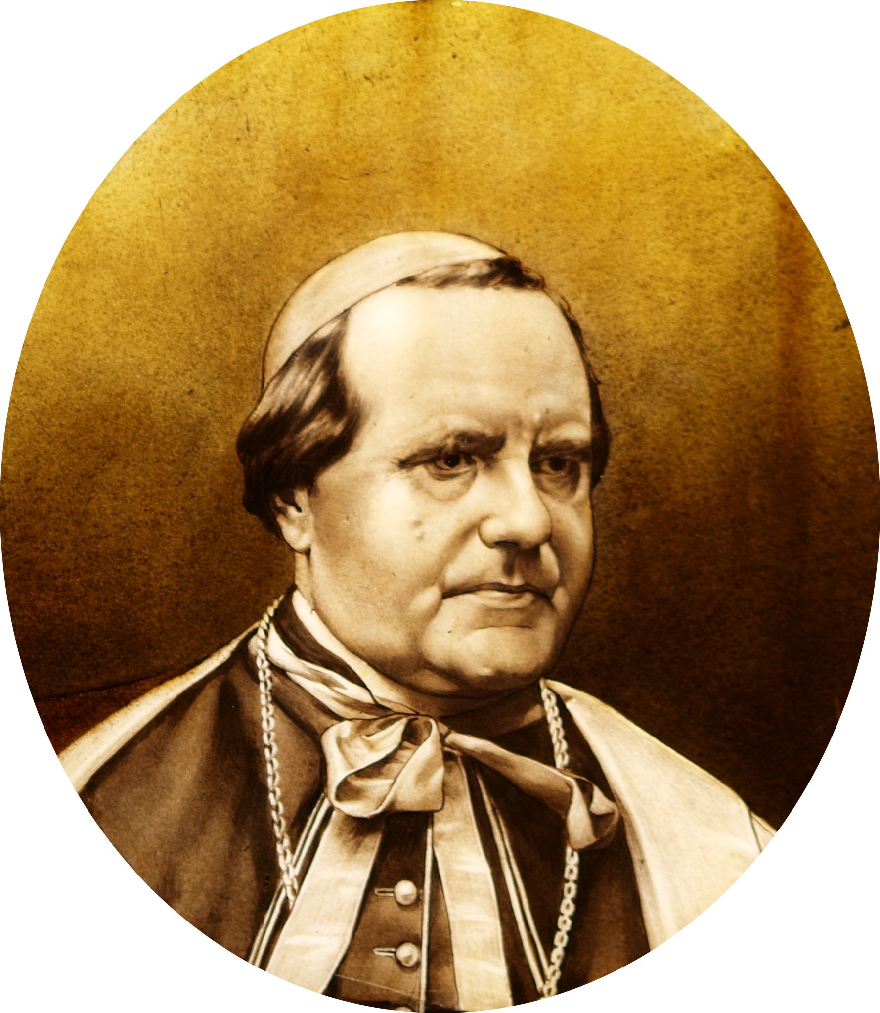 L'un des vitraux de l'église de Louvergny (Ardennes, France) ; portrait de Benoît Langénieux, archevêque de Reims lors de la construction de l'église (1895)